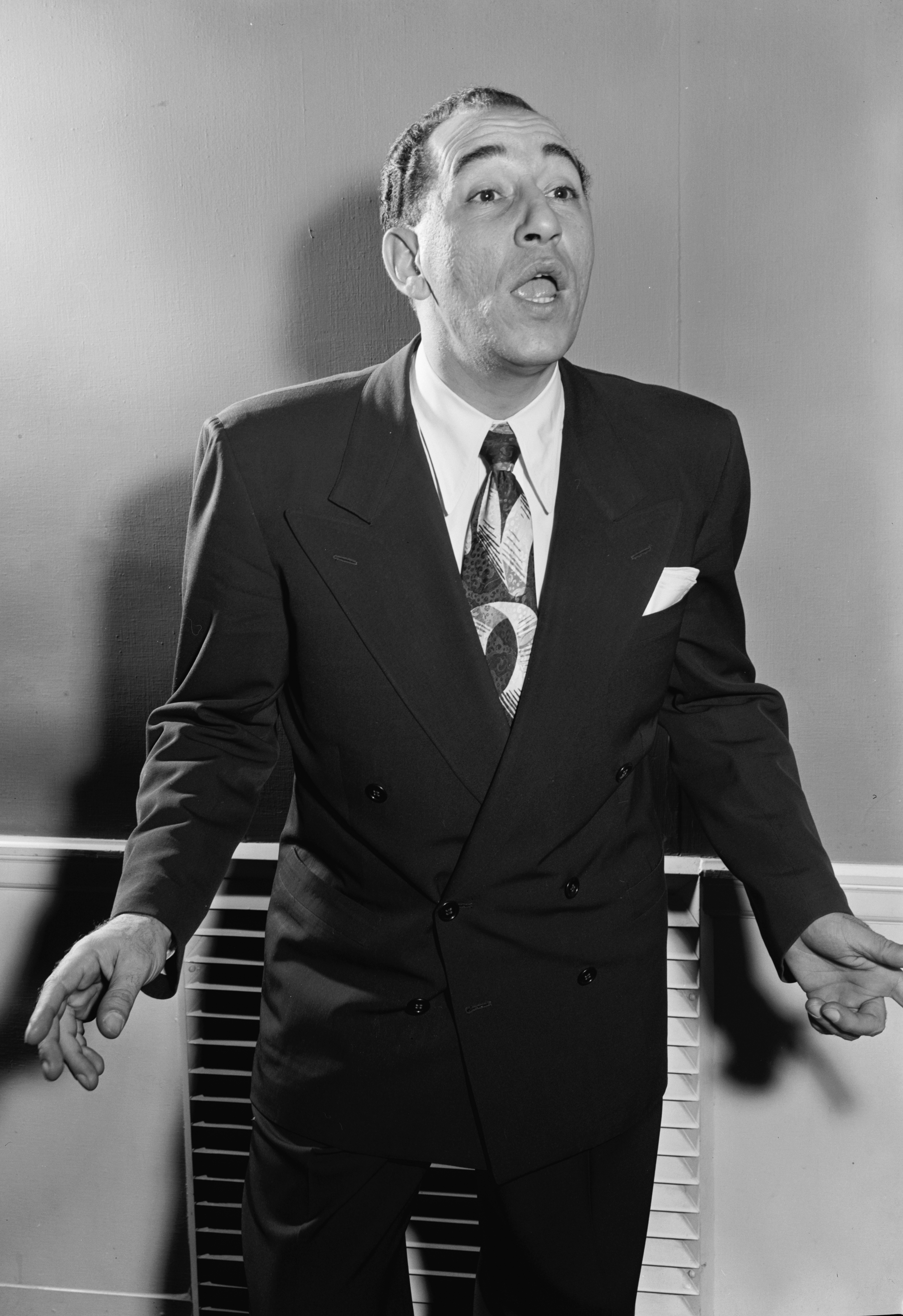 Singer Louis Prima